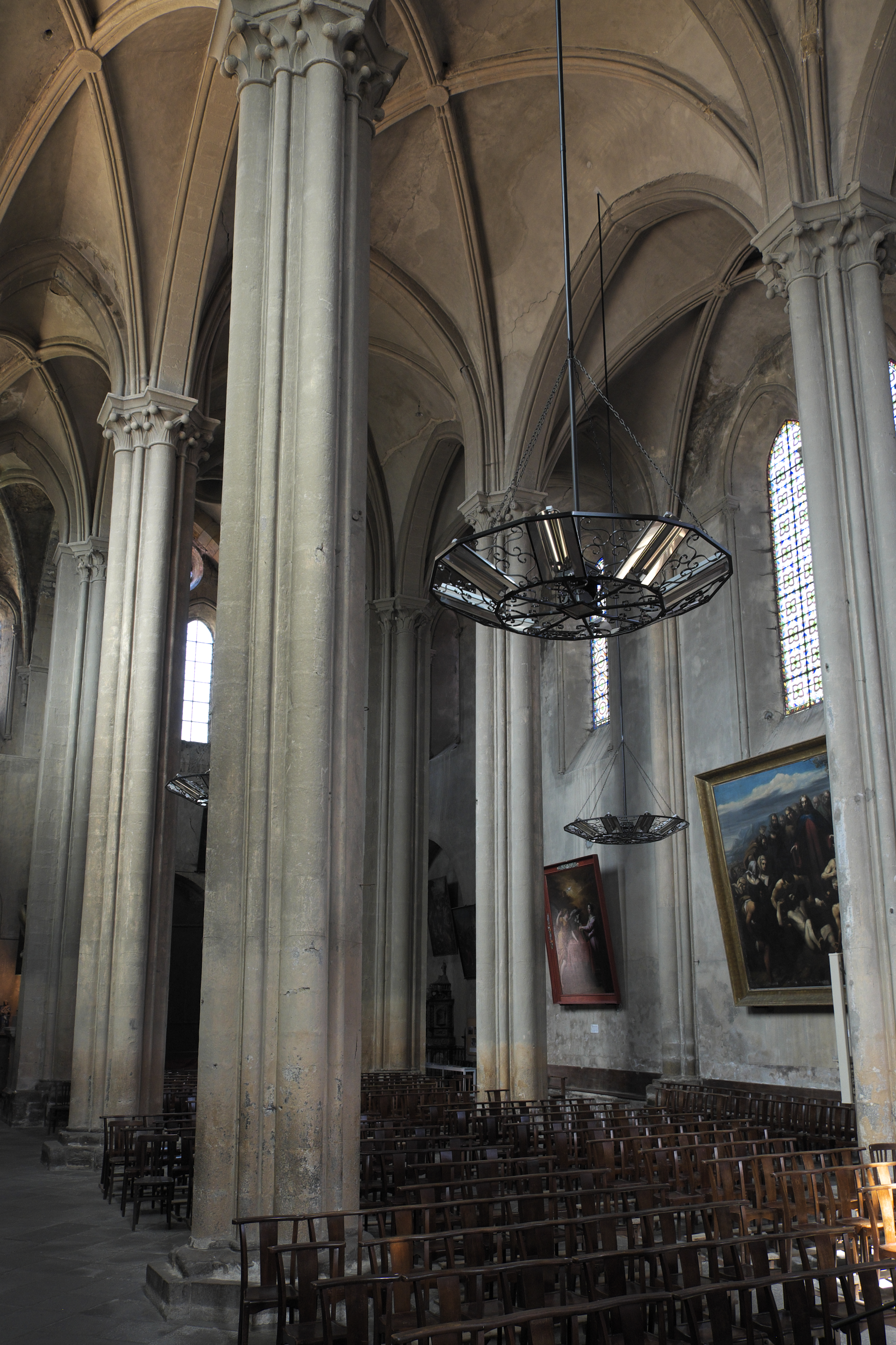 Katholische Pfarrkirche, ehemalige Stiftskirche, Saint-Cerneuf in Billom im Département Puy-de-Dôme (Auvergne-Rhône-Alpes), Innenraum